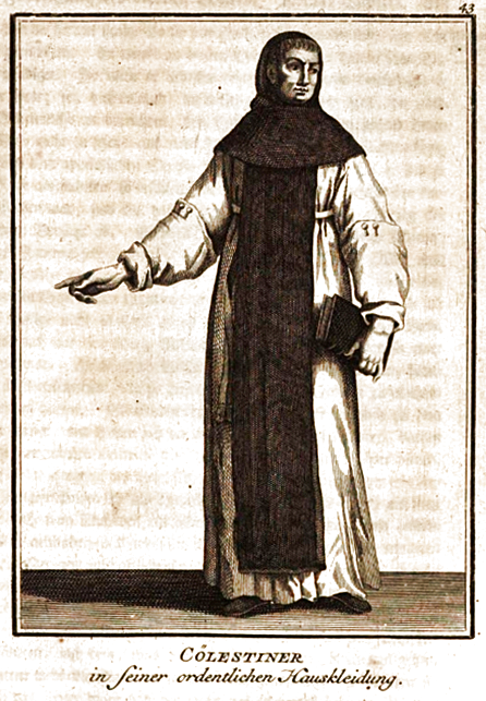 Cölestiner in Ordenstracht